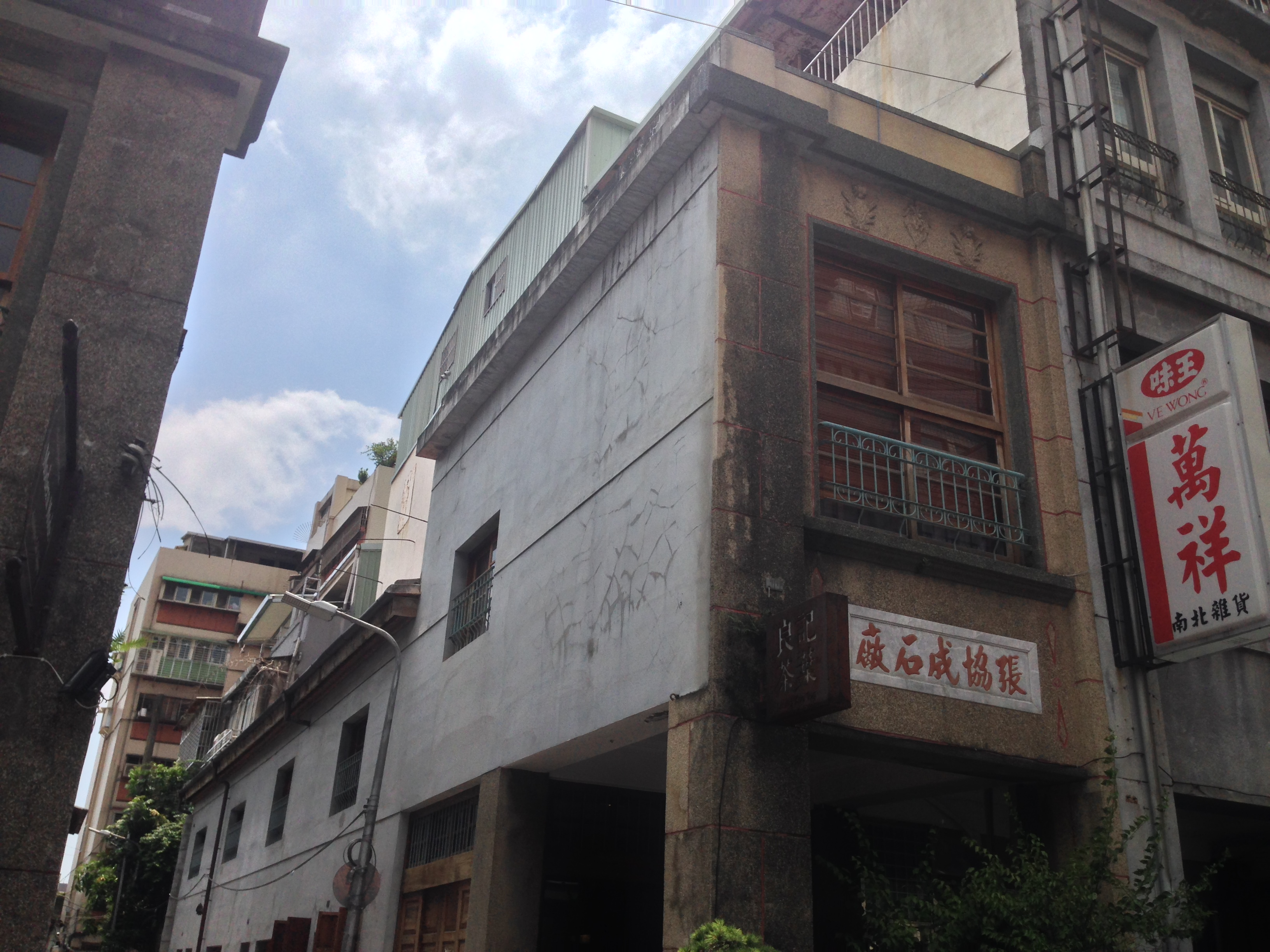 中文（台灣）: 迪化街張協成石廠